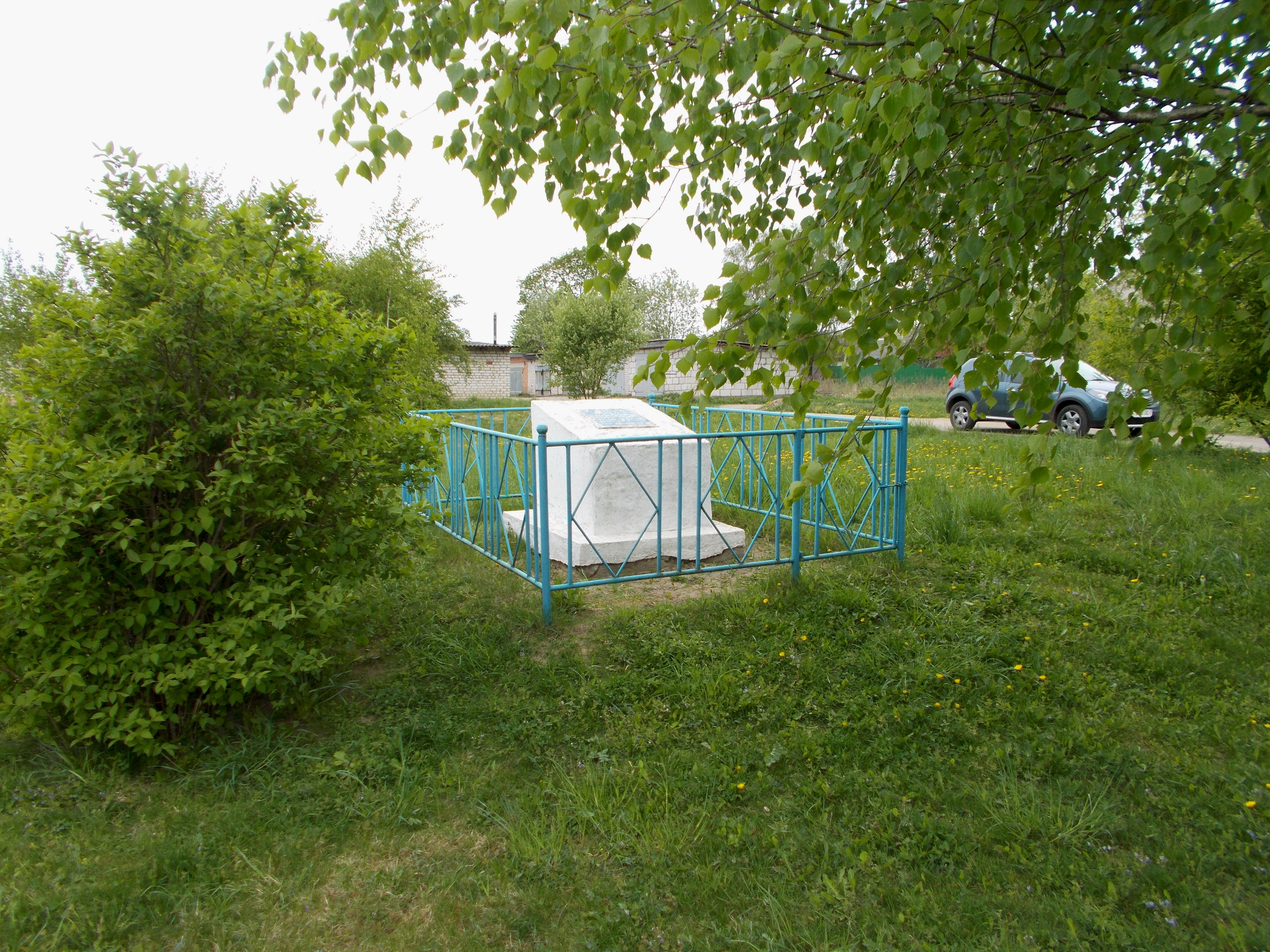 Памятник на одном из мест массовых убийств евреев Воложина во время Холокоста. Находится напротив через дорогу от городской больницы Воложина (улица Горького, 13).